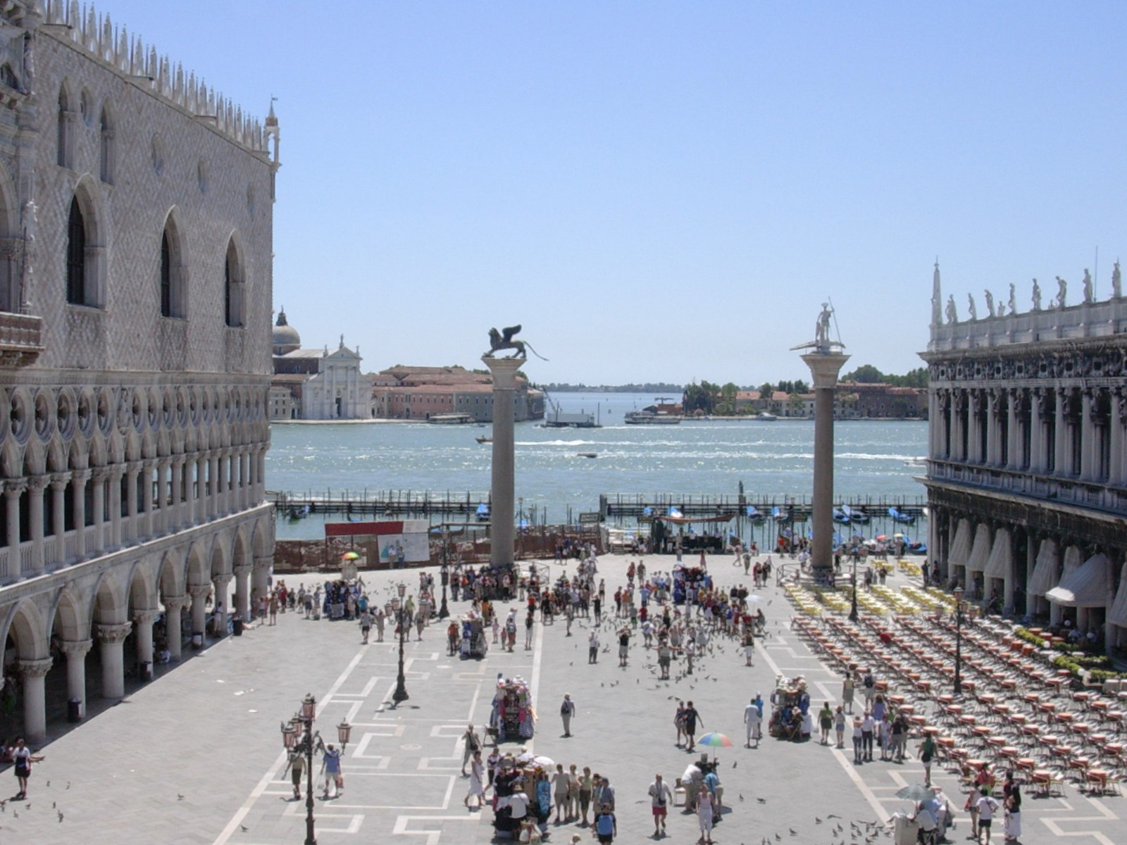 Piazzetta San Marco in Venezia - view from Basilica San Marco